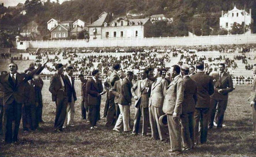 La délégation française aux JO de 1932, de retour au Havre (G. Hostier, D. Noel).